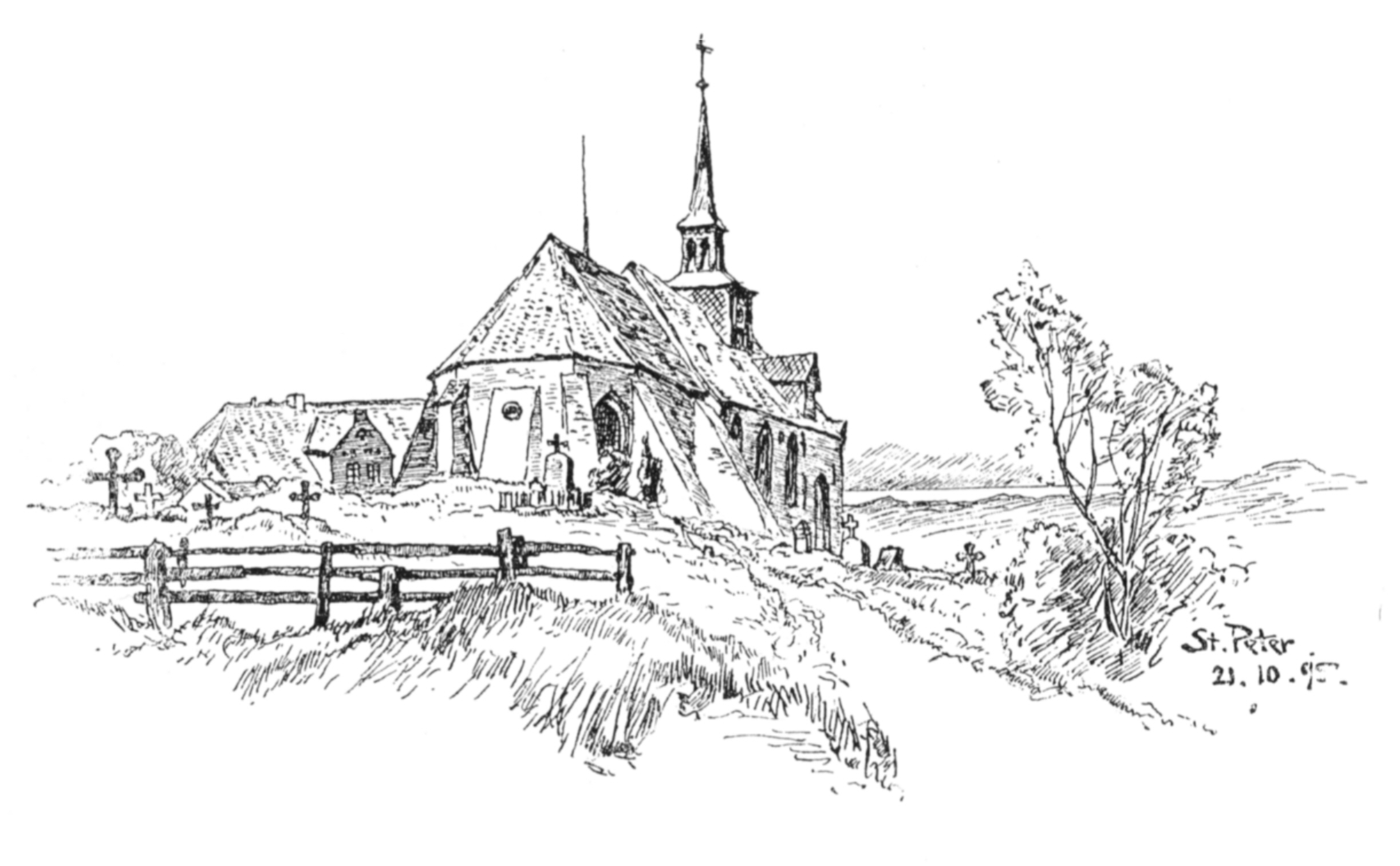 Die Kirche von St.Peter, Zeichnung von Fritz Stoltenberg